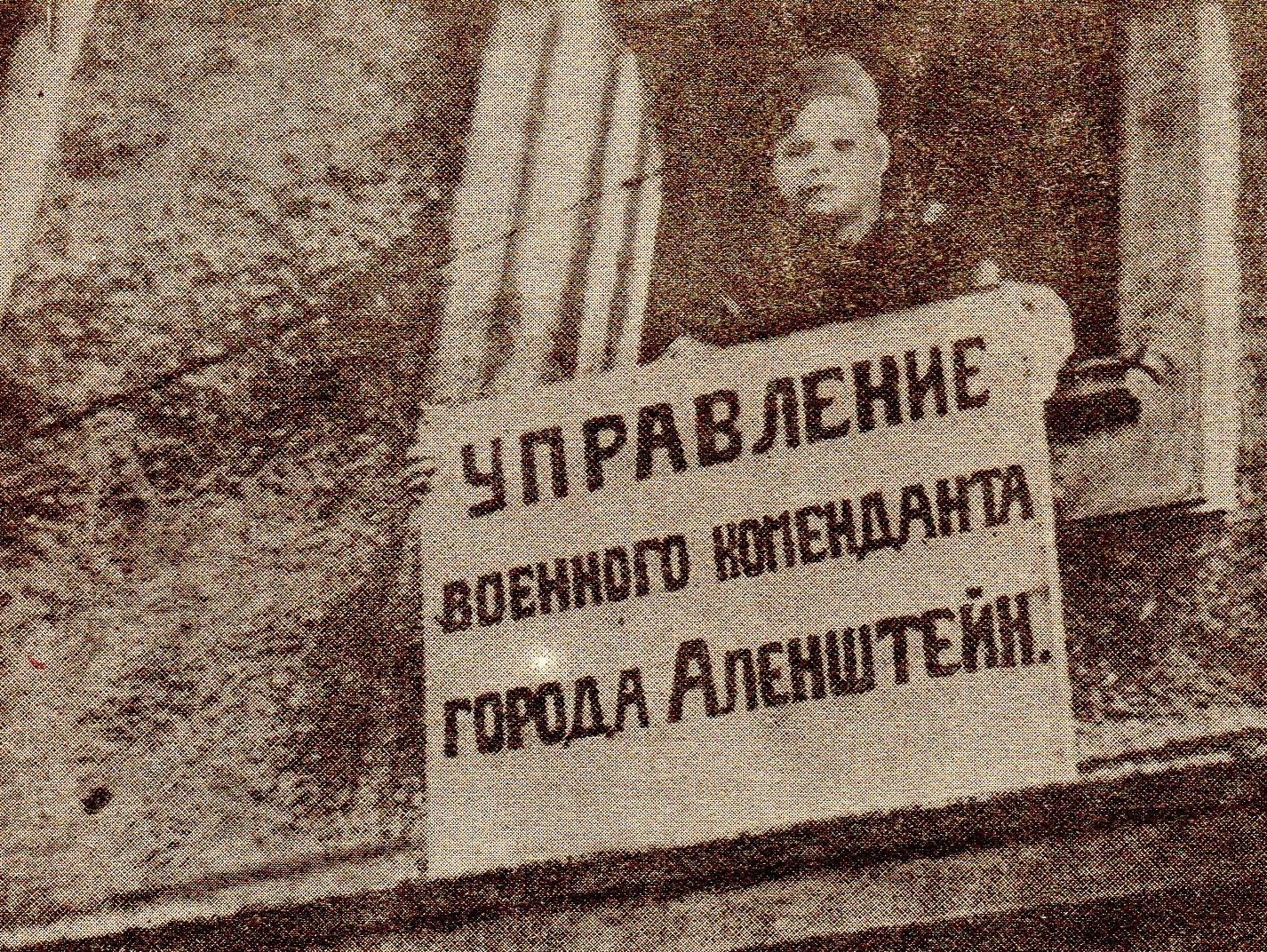 Radziecka komendantura wojenna w Olsztynie. 1945r.